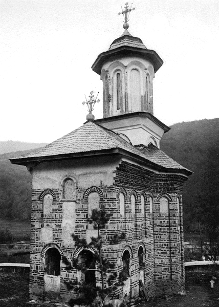 Cozia Monastery, Bolniţa Church